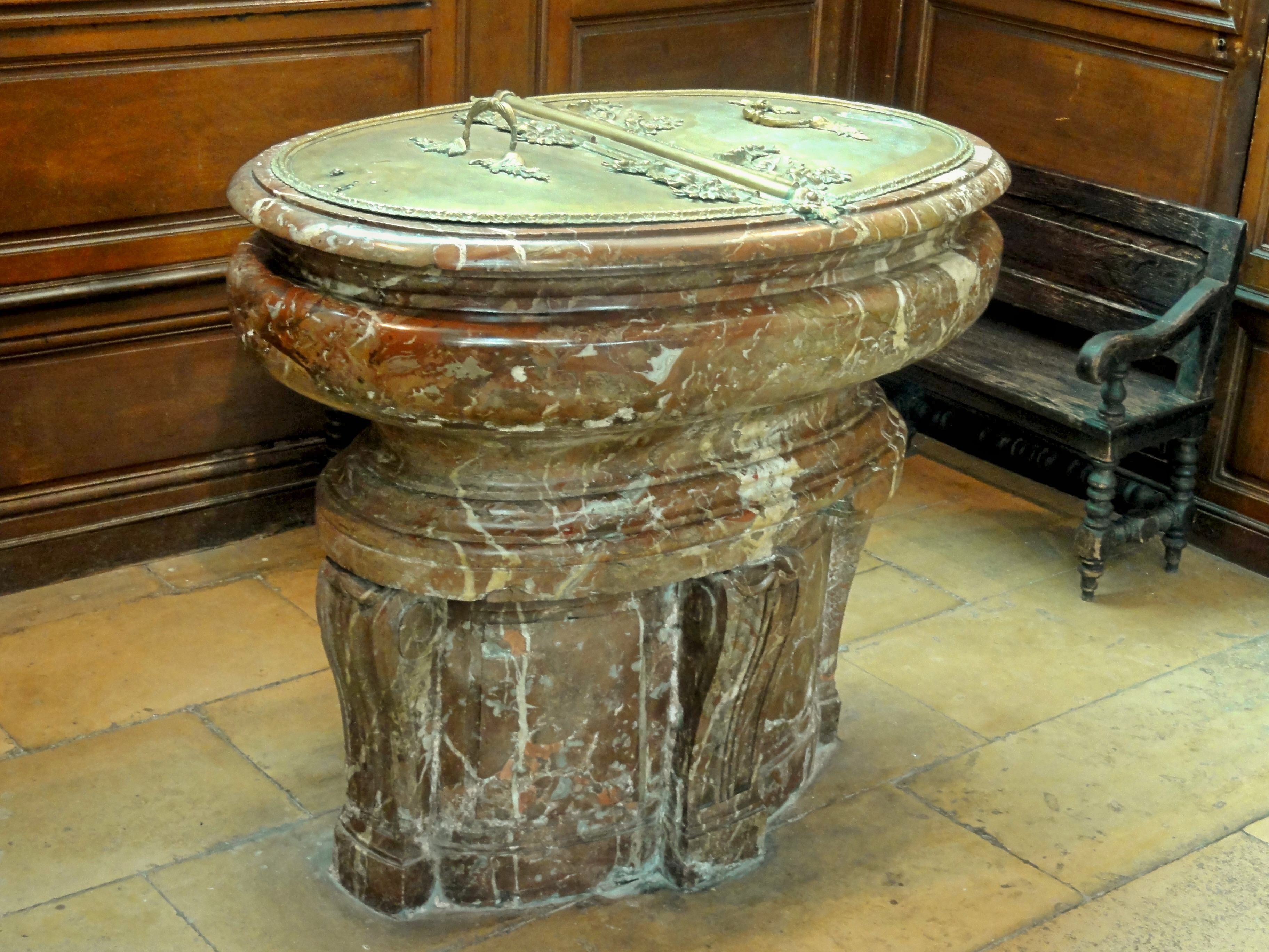 Les fonts baptismaux.